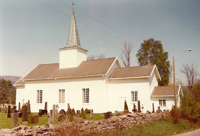 Svarstad kirke